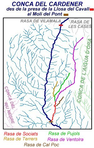 Mapa d'un fragment de la Conca del Cardener (de la presa de la Llosa del Cavall al Molí del Pont) on hi apareixen remarcades la Rasa de Sociats, la Rasa de Pujols, la Rasa de Terrers, la Rasa de Ventolra i la Rasa de Cal Poc.